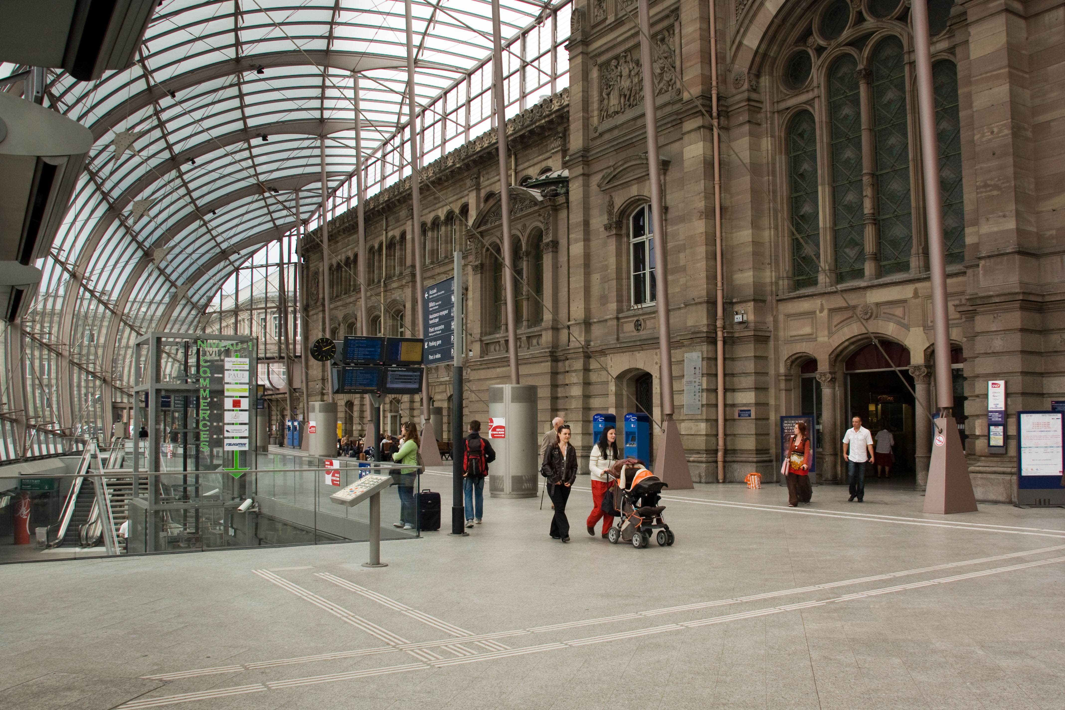 Gare de Strasbourg, Strasbourg, Bas Rhin.